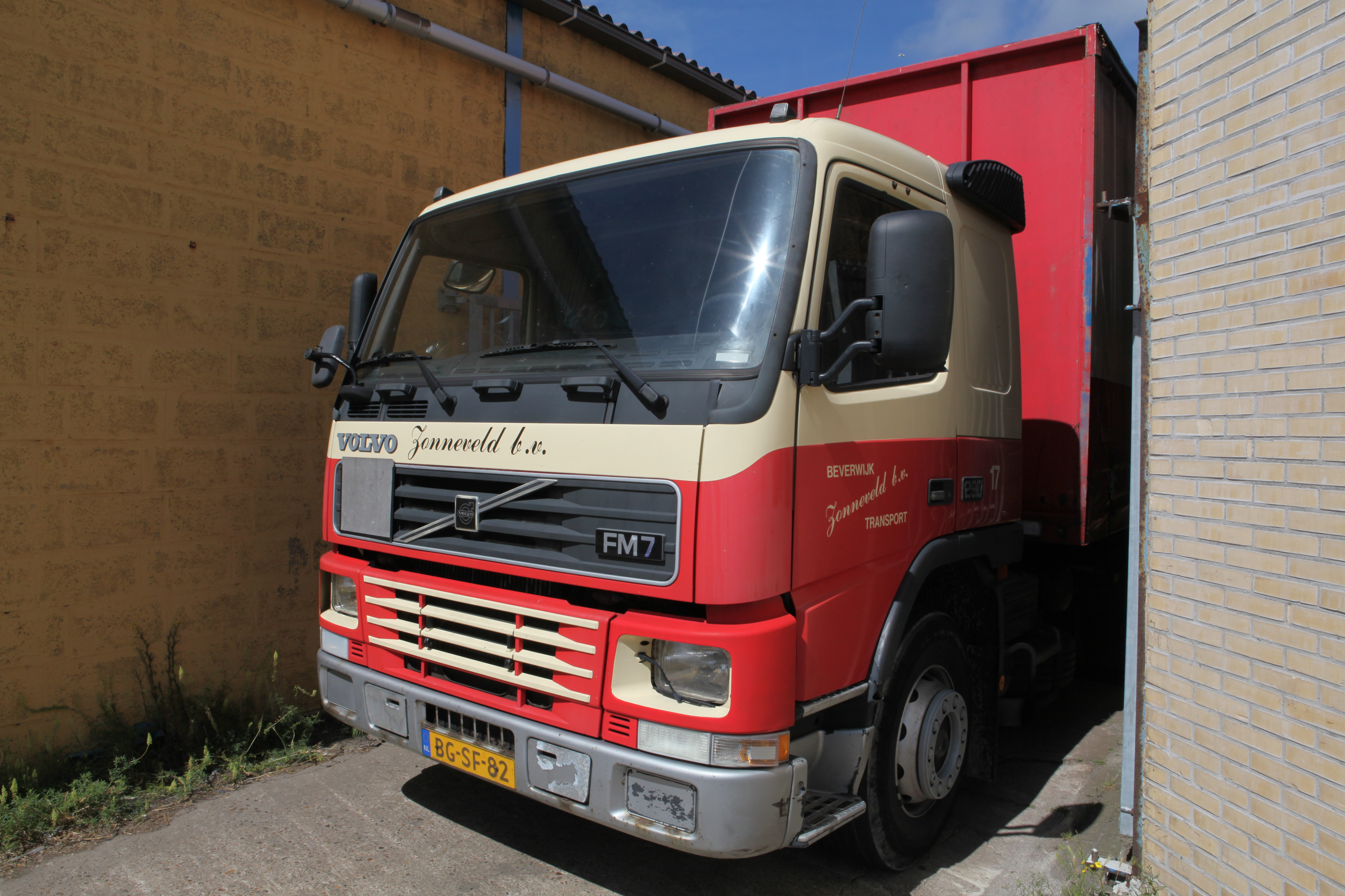 Volvo FM 7 290 Zonneveld Beverwijk.